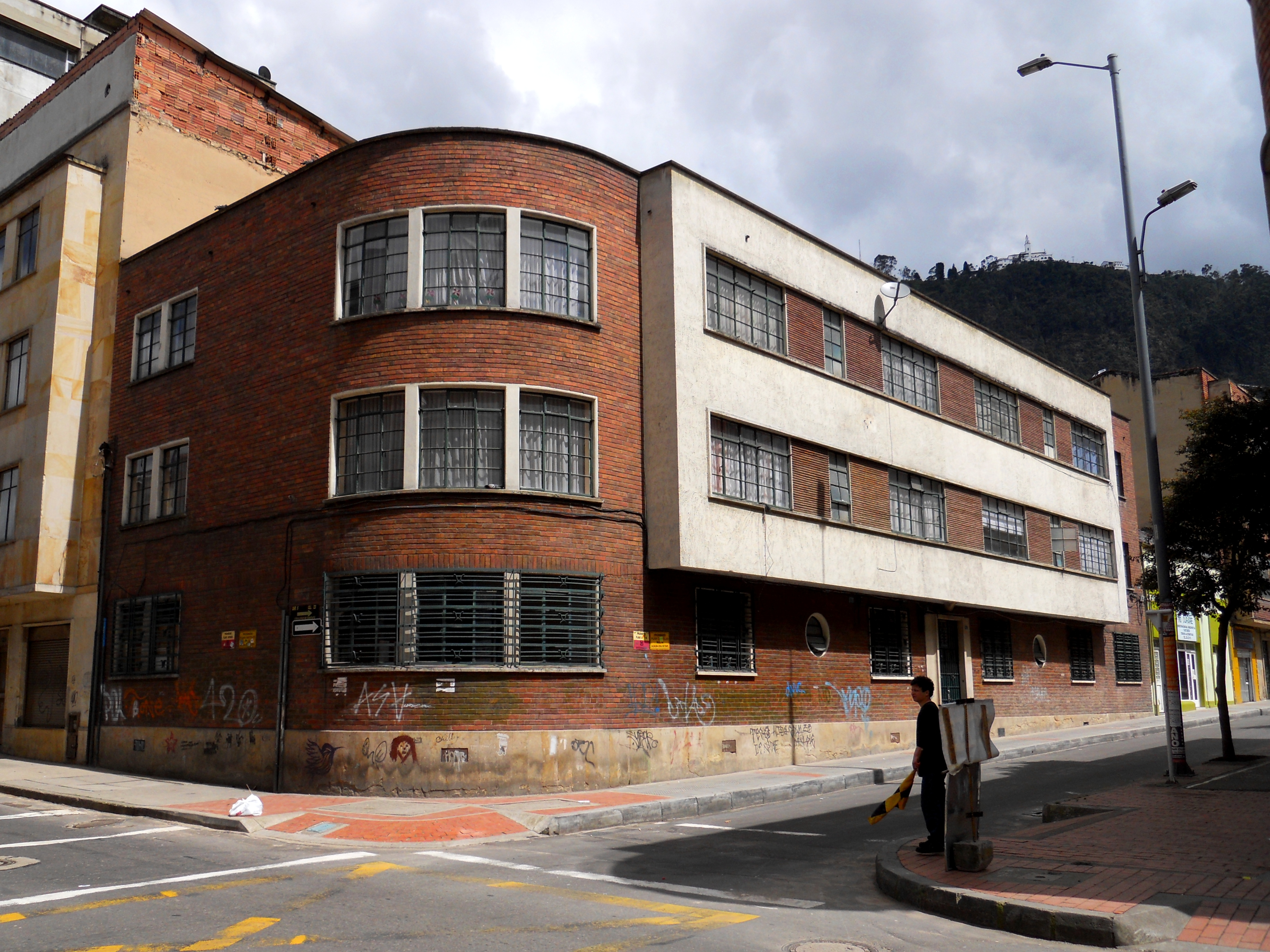 Bogotá, carrera Quinta con calle Veintitrés.